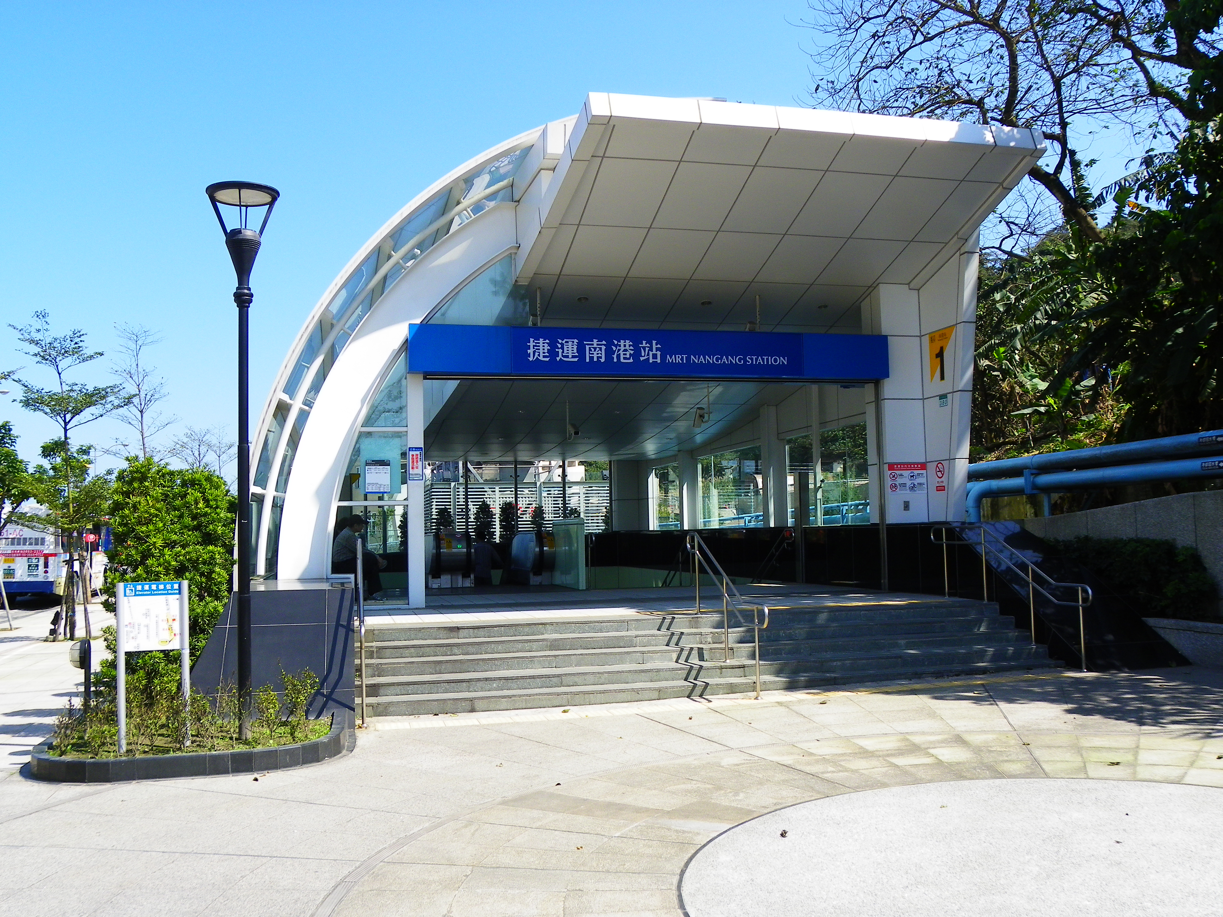 台北捷運南港線南港駅の1号出口。